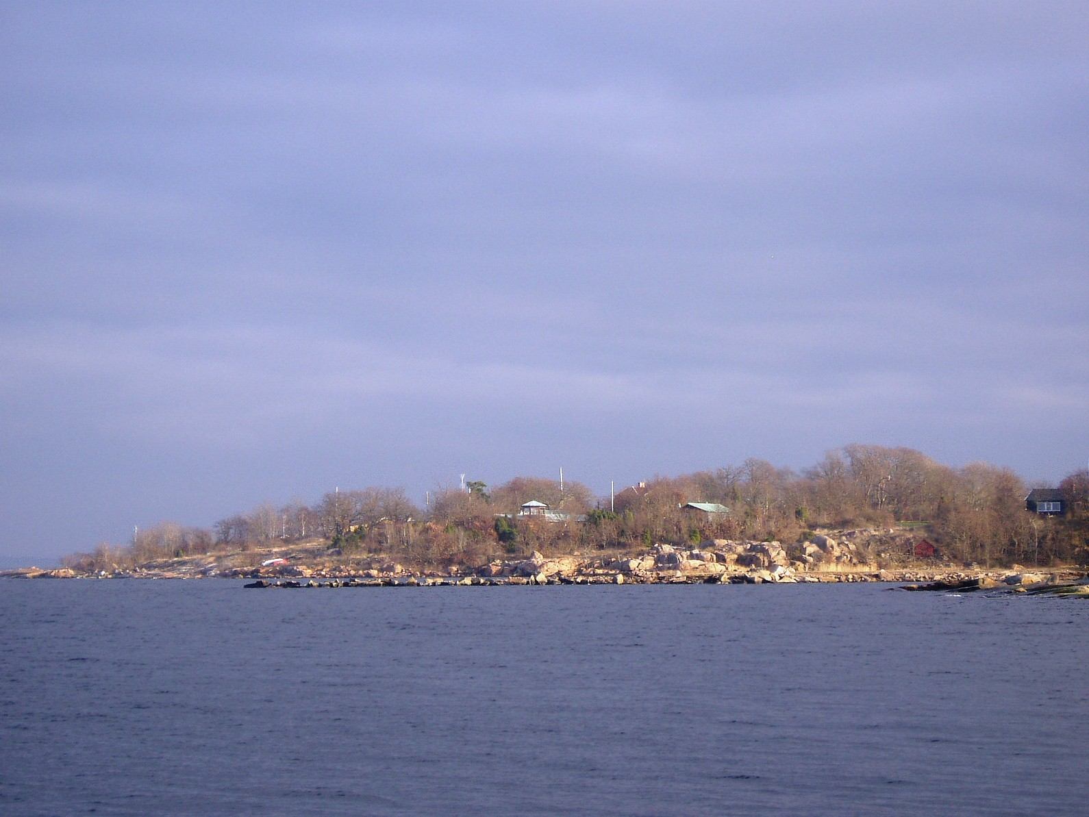 Tjurkö, iland in Blekinge, Sweden